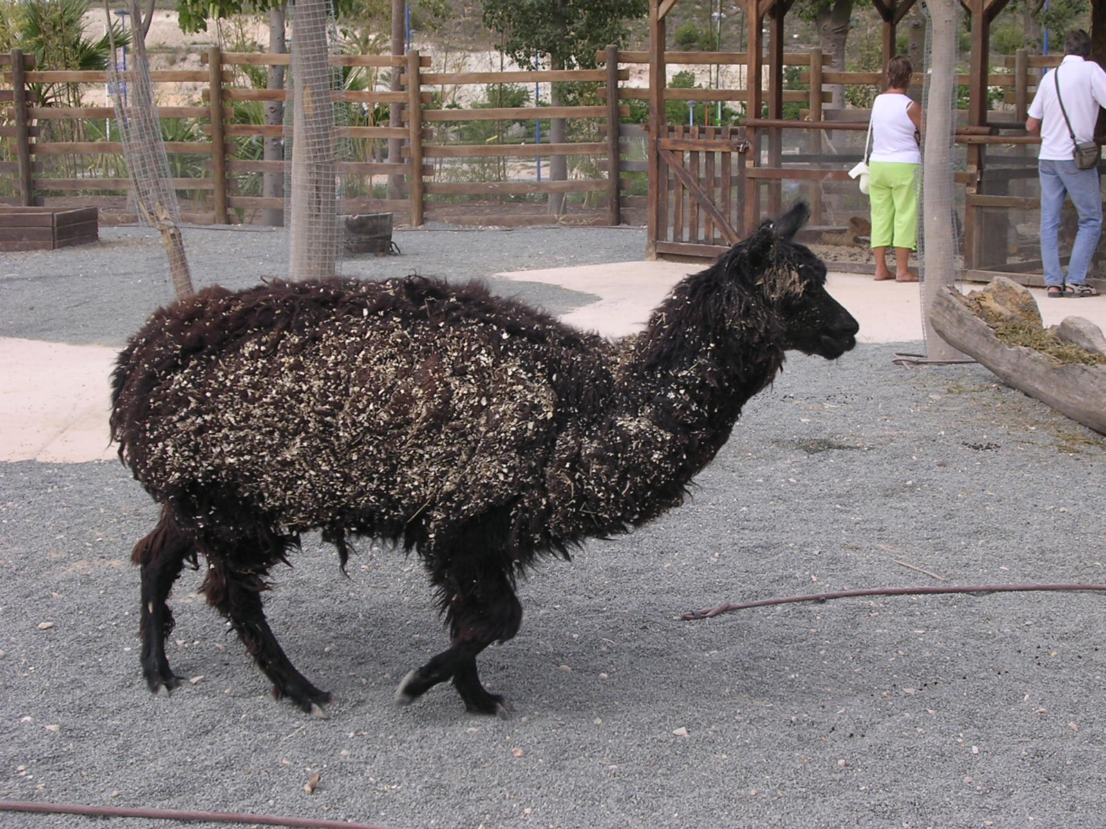 lama, Terra Natura, BenidormTerra Natura